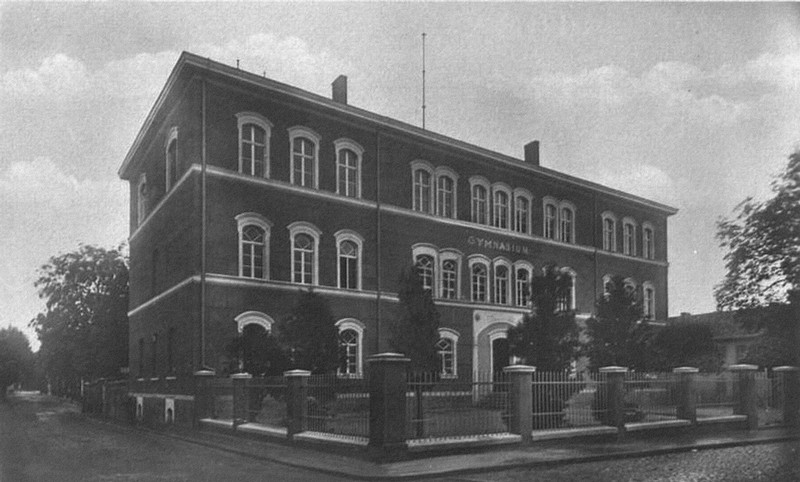 Miejskie Gimnazjum im. Fryderyka Wilhelma w Greifenberg/Pommern (Niemcy) - dziś Gryfice (Polska)